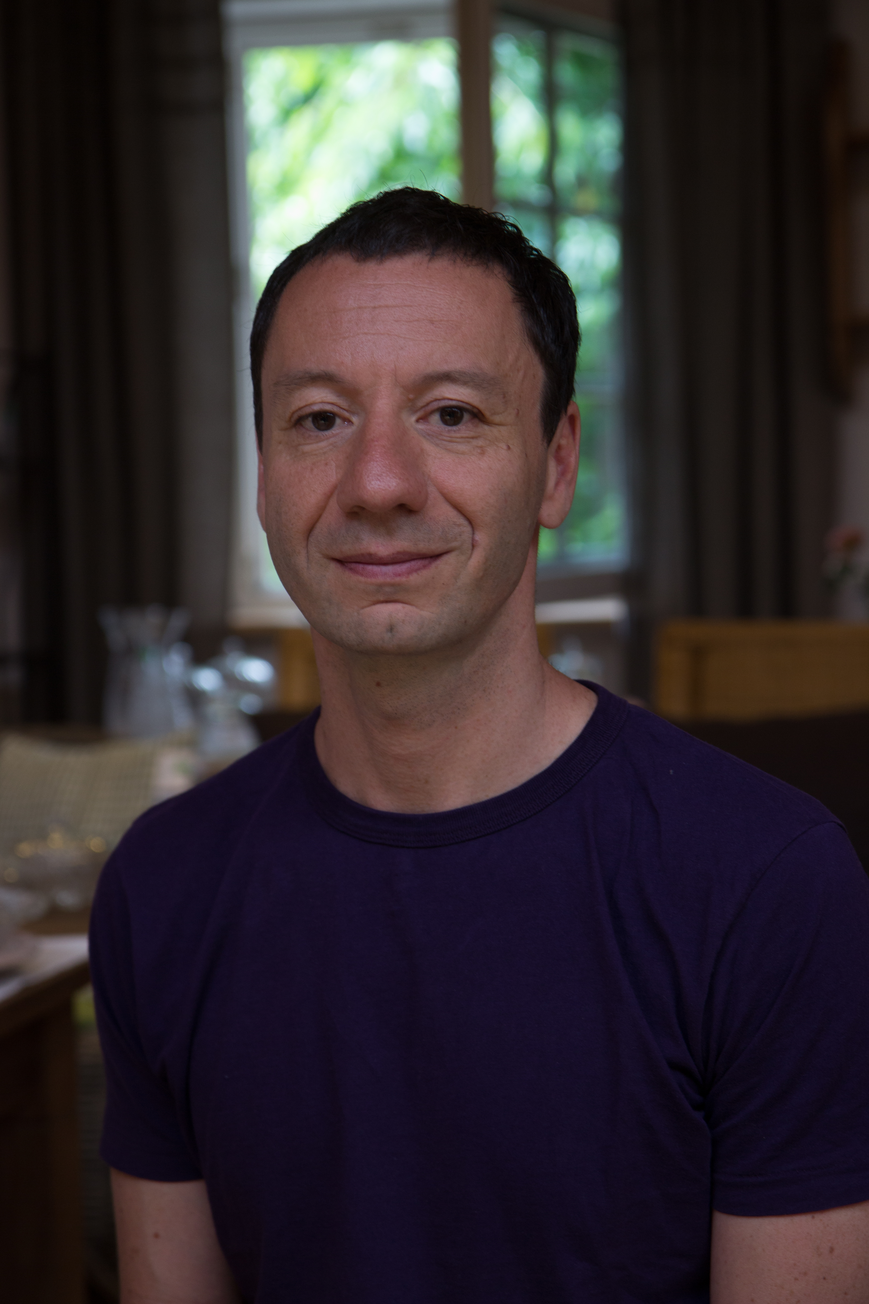 Der Schriftsteller Selim Özdogan beim Hausacher Leselenz 2013